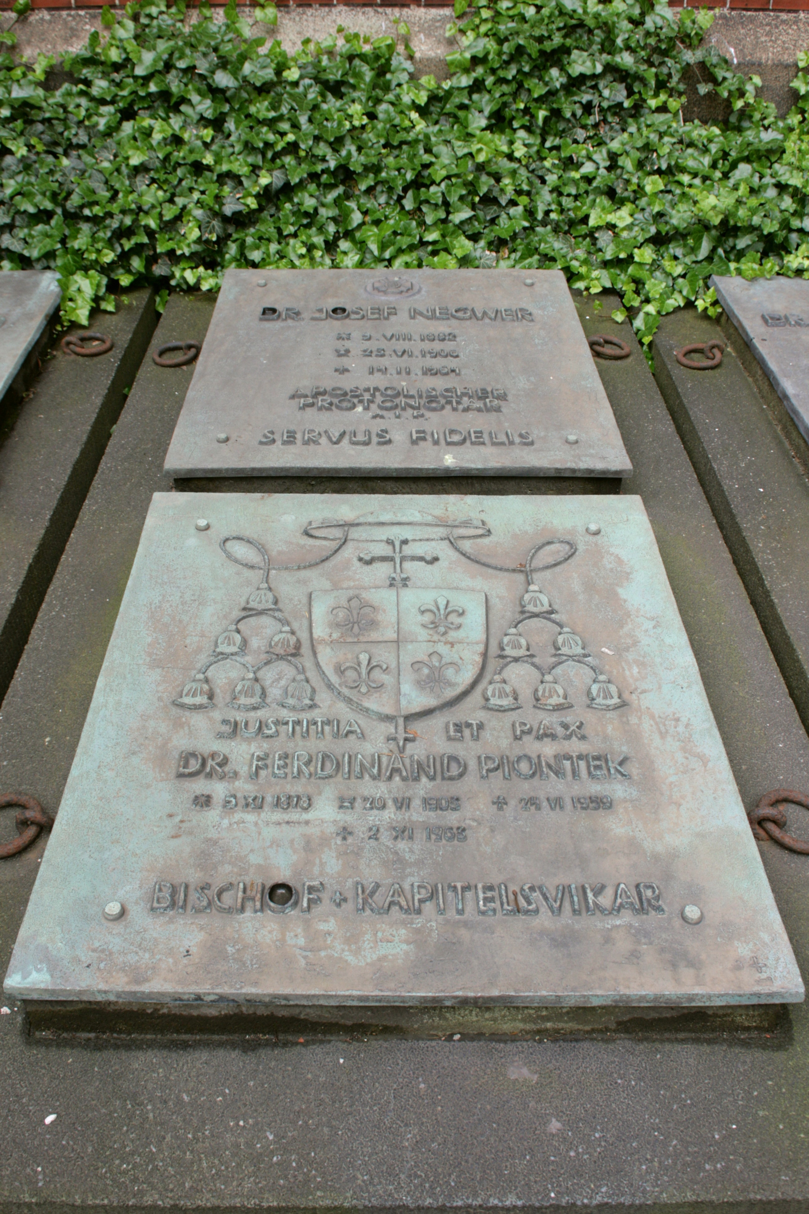 Jakobuskathedrale, An der Jakobuskirche in Görlitz